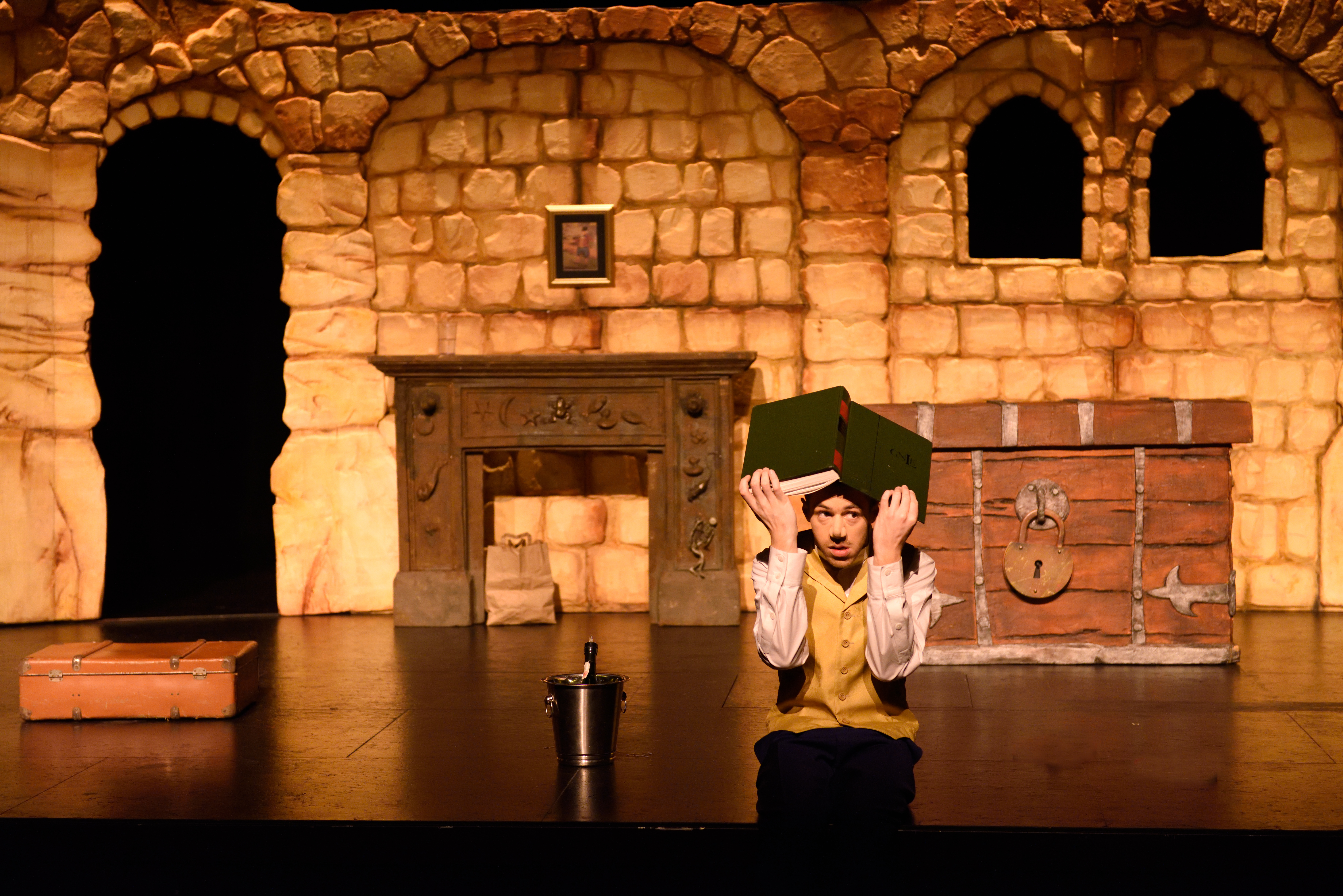 Jahon tijdens de voorstelling GEHEIMEN. Foto genomen tijdens de première in cultuurcentrum "Breughel" in Bree.